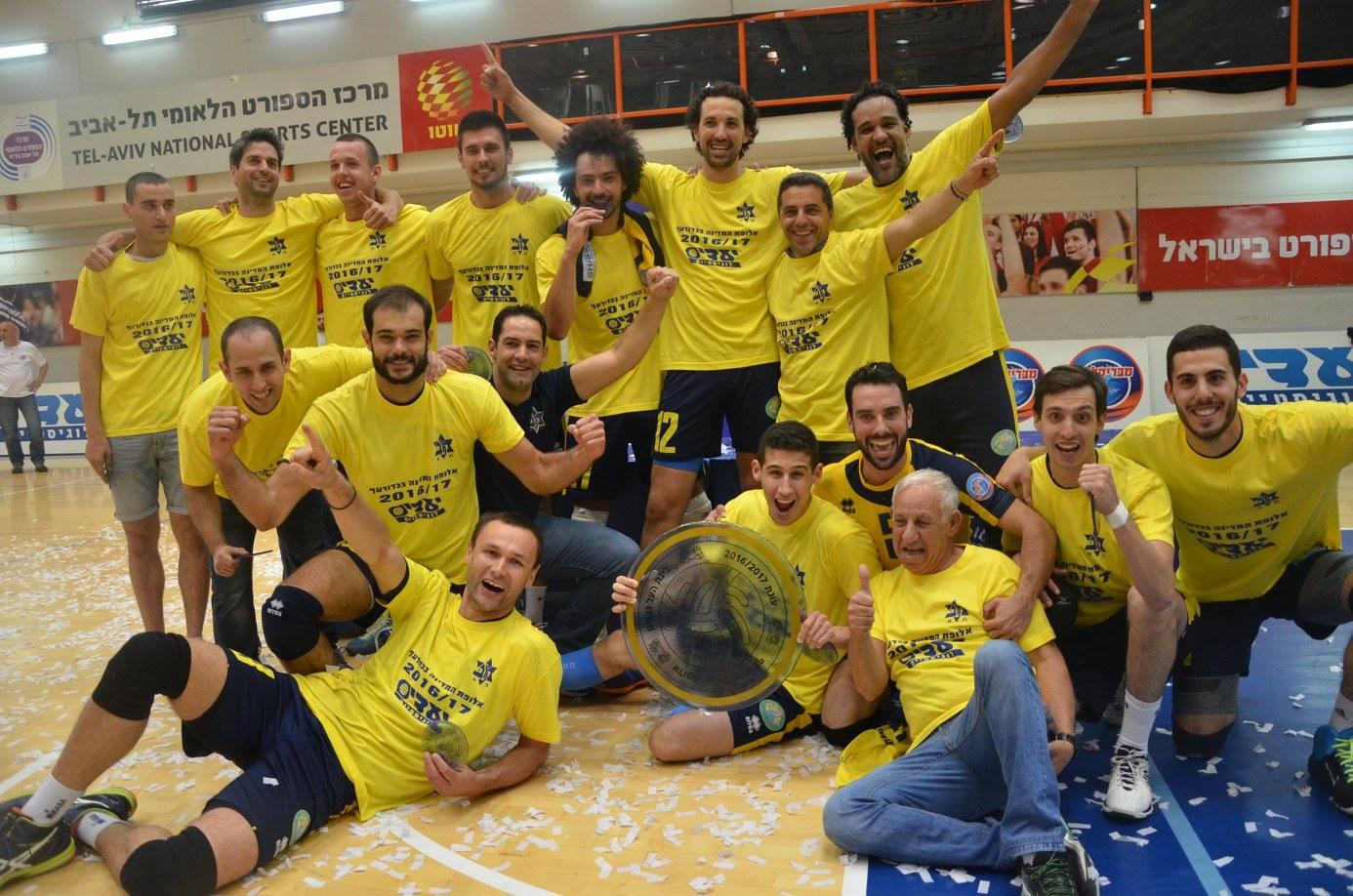 מועדון כדורעף מכבי תל אביב - אלופי המדינה לעונת 2017